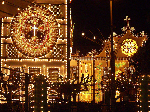 Santuario de Senhor Santo Cristo